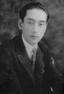 秋田伸一、1920年代の写真